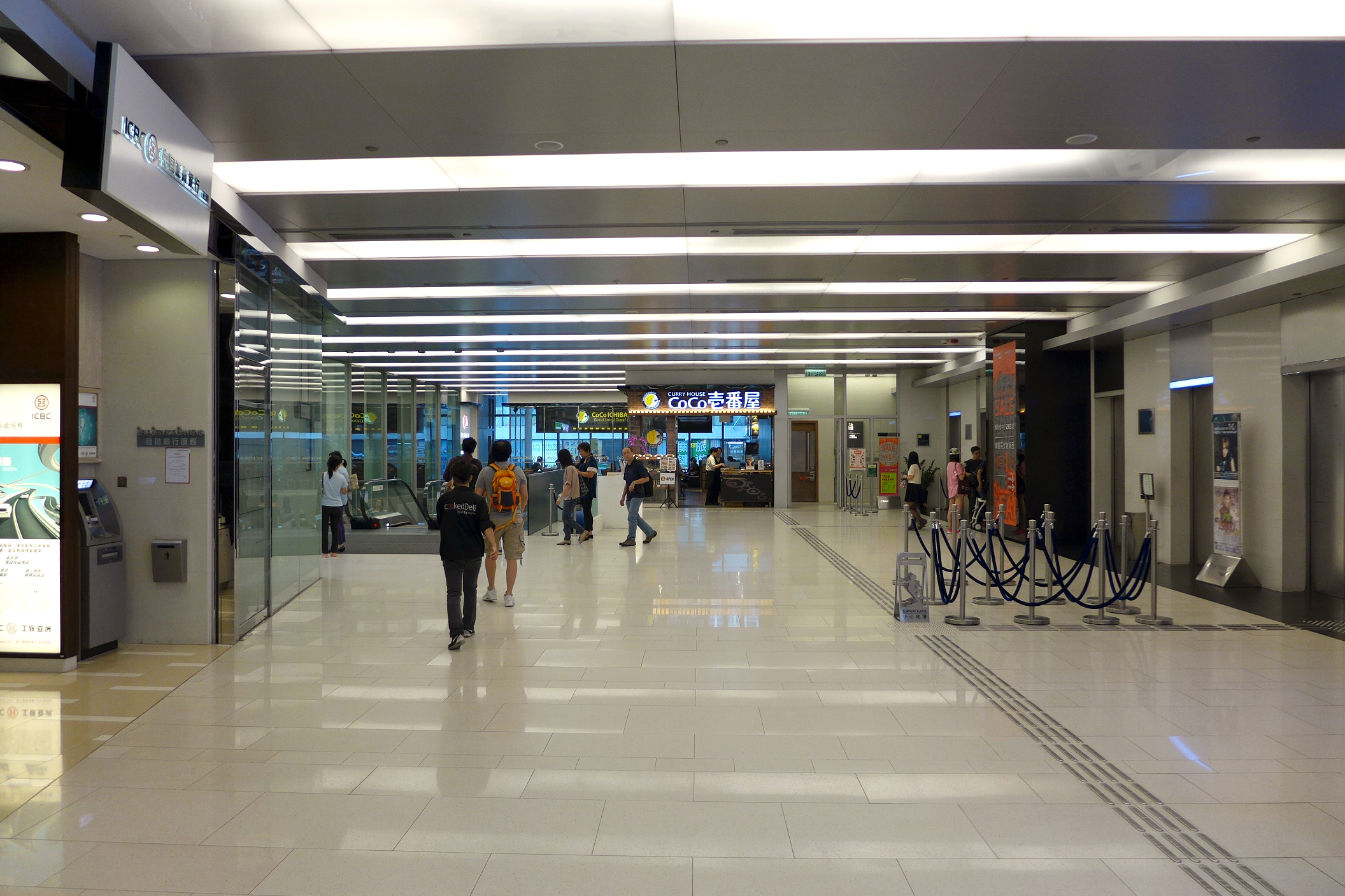 Crocodile Center Lobby